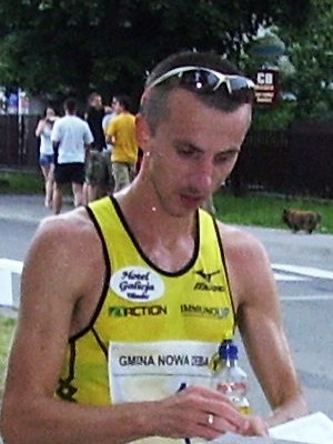 Grzegorz Sudoł - polski lekkoatleta, chodziarz, wielokrotny mistrz polski